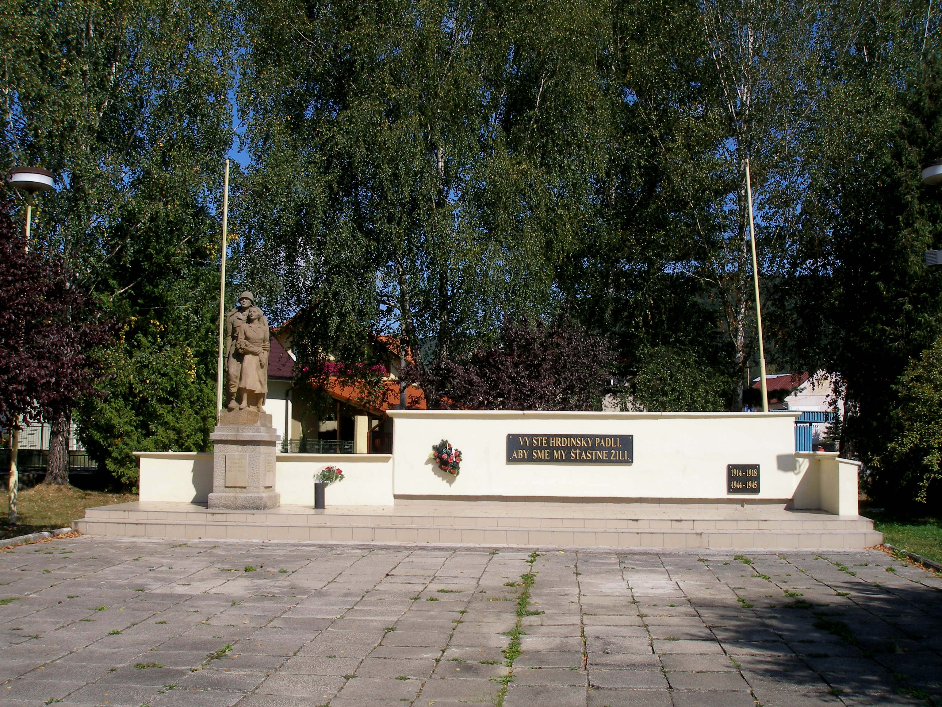 Spišská obec Margecany. Okres Gelnica.